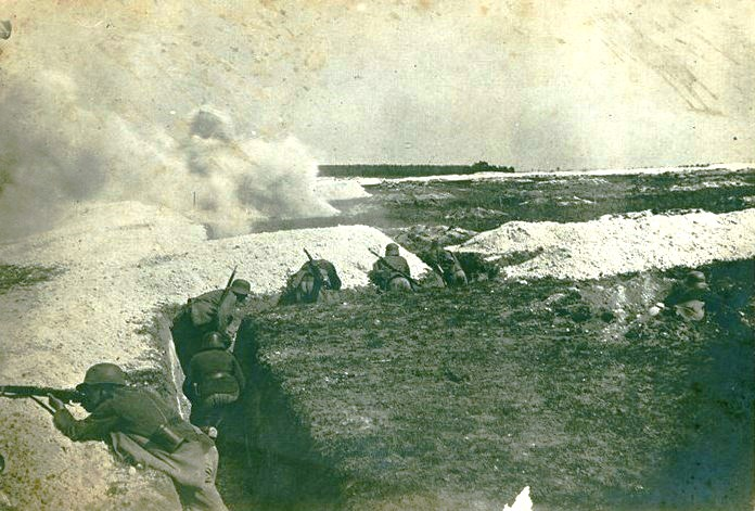 Снимка от акция на австро-унгарска ударна група по прогонване с гранати на руска войскова част в Източна Галиция, Украйна през Първата световна война.